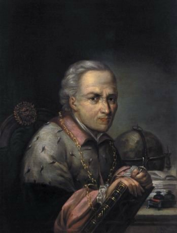 Profesor Rafał Józef Czerwiakowski